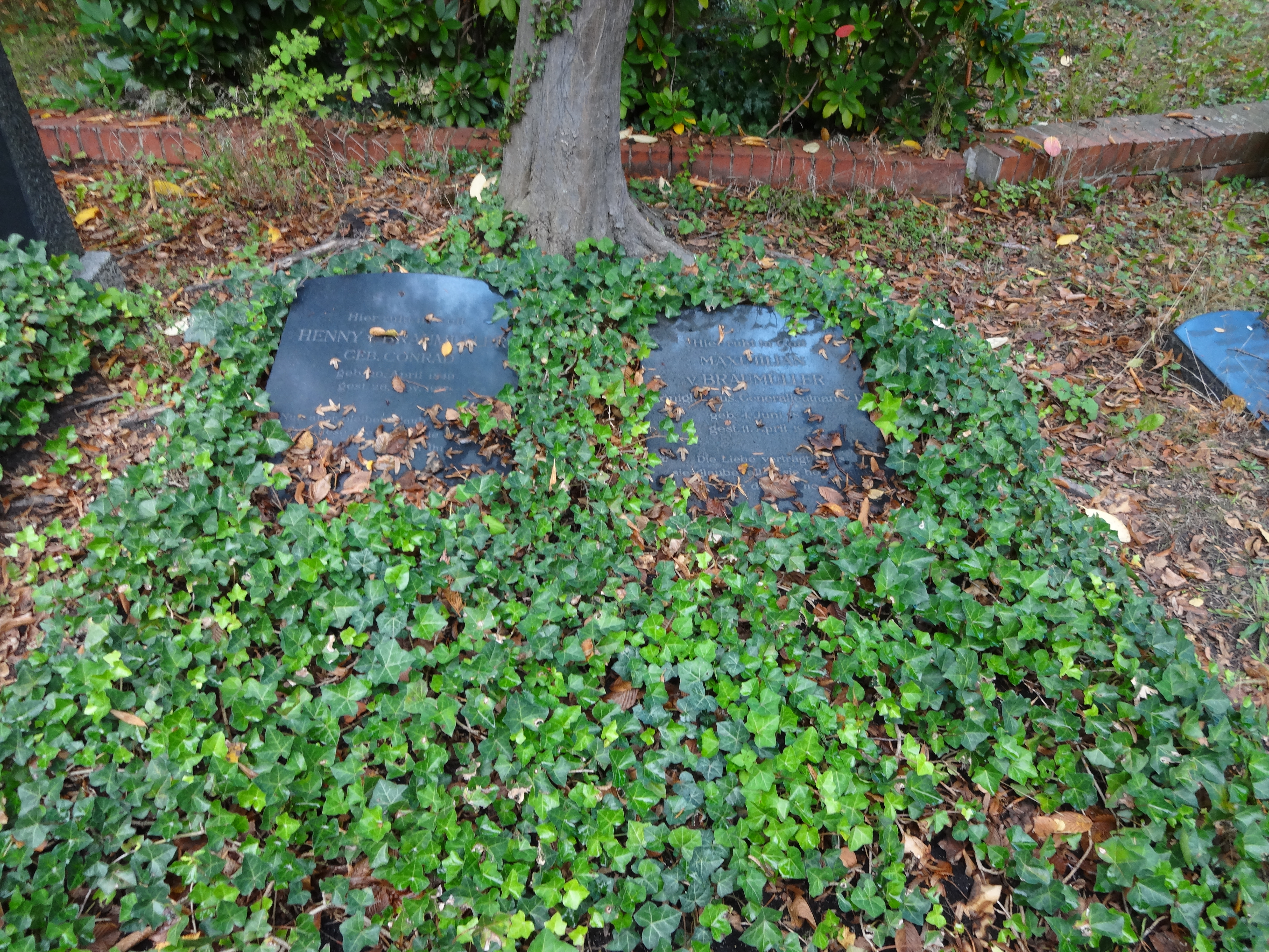 Grab von Maximilian von Braumüller auf dem Friedhof Wannsee, Lindenstraße